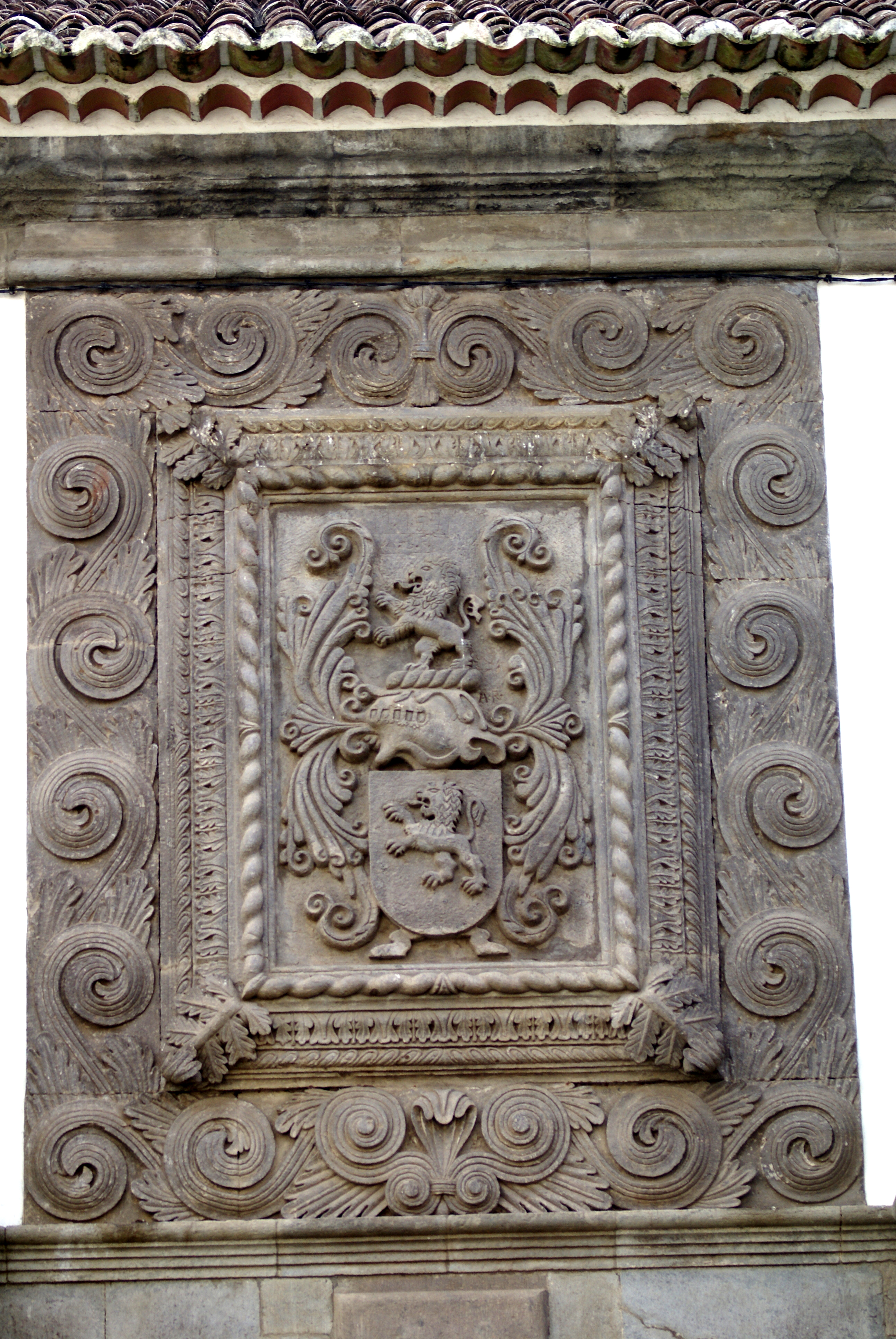 Brasão de Armas da Família Bettencourt que se encontra na fachada do Palácio Bettencourt, Angra do Heroísmo, ilha Terceira, Açores